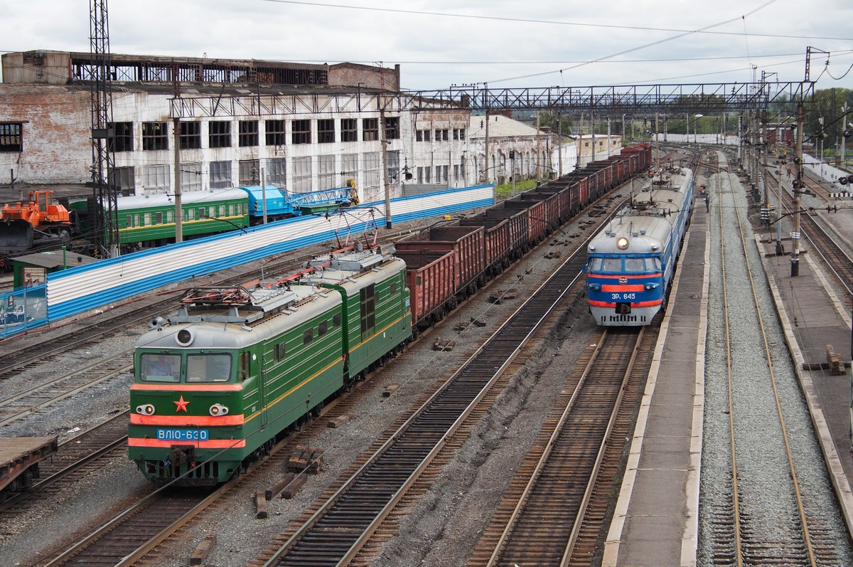 Станция Белово